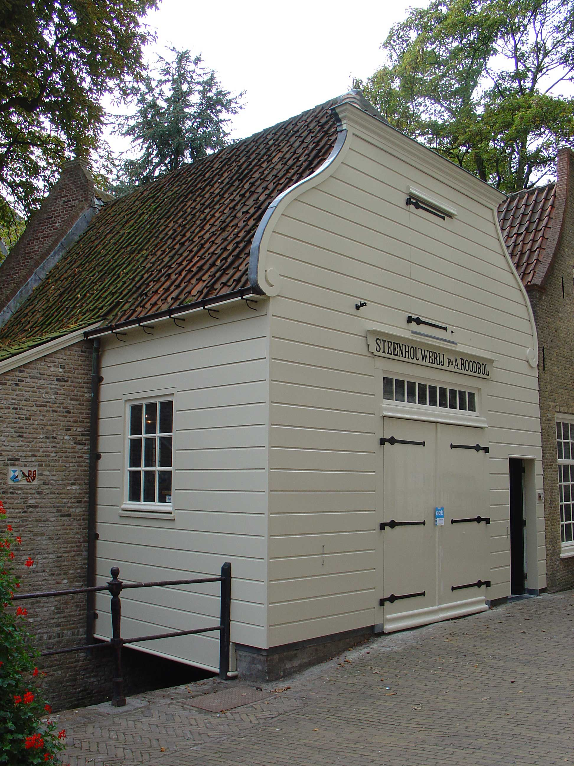 Steenhouwerij Roodbol Achter de Kerk Gouda